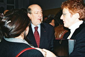 Hervé Bourges lors des fêtes du 80e anniversaire de l'ESJ, à Lille, en 2004.